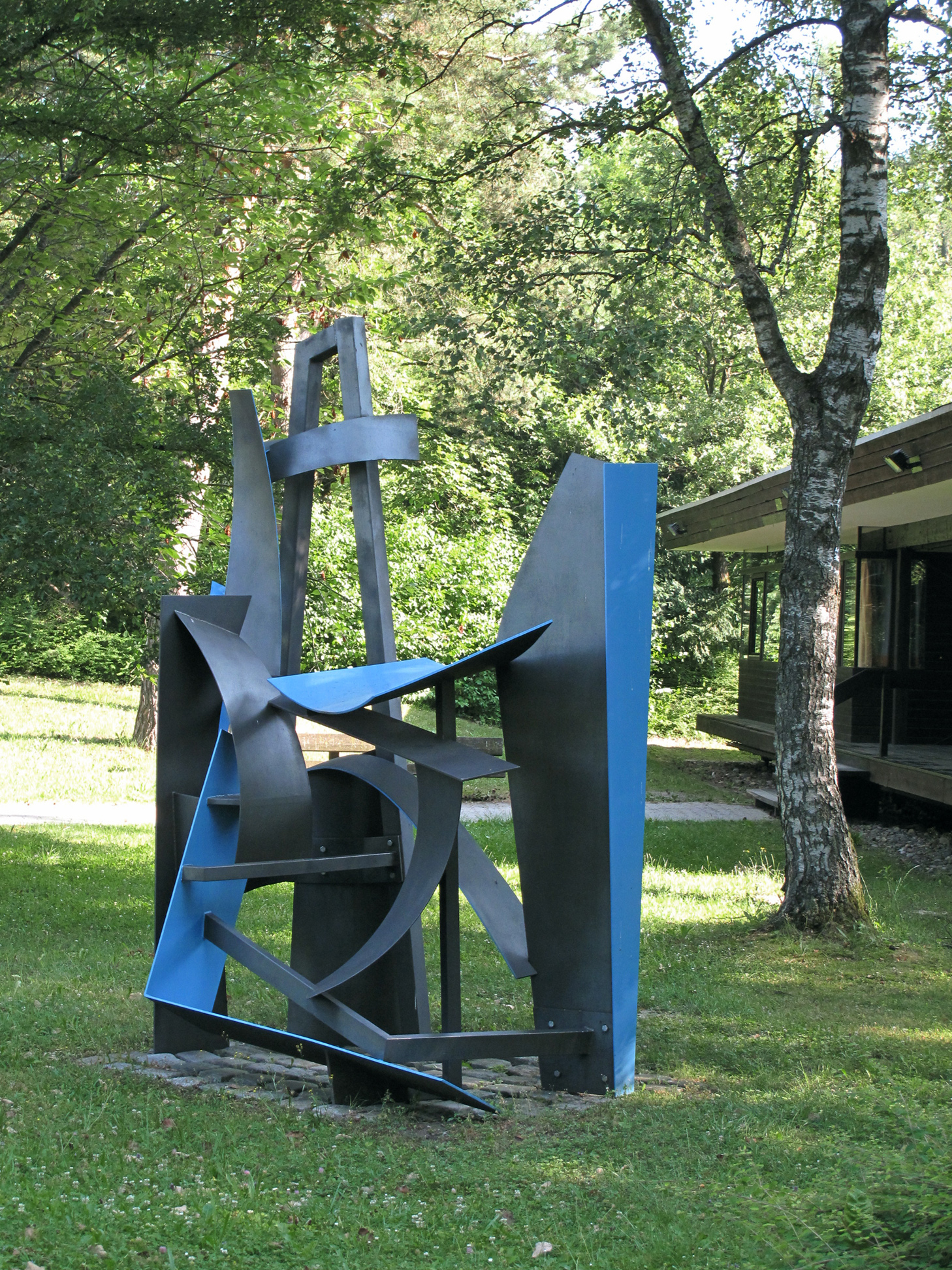 Gisela v. Bruchhausen, Sous le ciel, 1989, - Kunstpfad Universität Ulm, Deutschland, Baden-Württemberg